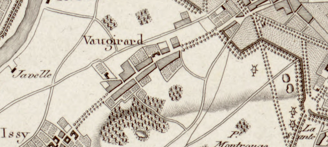 Plan de l'agglomération de Vaugirard en 1805. Détail du plan de Paris et de ses environs de Joseph Lantz, 1805.